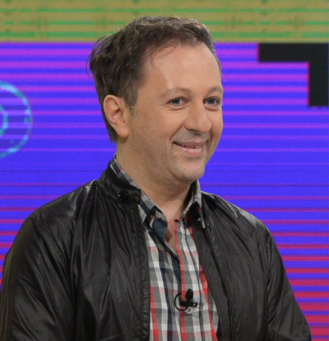 pura vida Pura Vida, programa de la TV Pública.